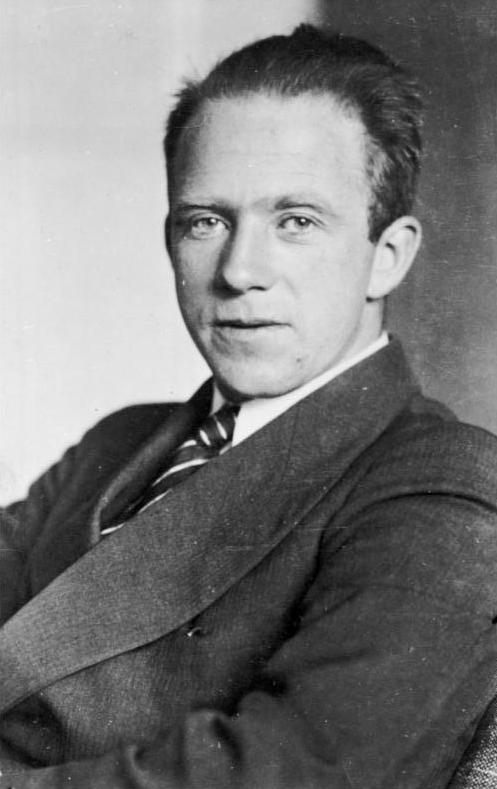 Zentralbild Prof. Dr. phil Werner Kar. Heisenberg, Physiker, geboren 5.12.1901 in Würzburg, Professor für theoretische Physik, Direktor des Max-Planck-Instituts für Physik in Göttingen, Nobelpreis für Physik 1932 (Aufnahme 1933) 39049-33